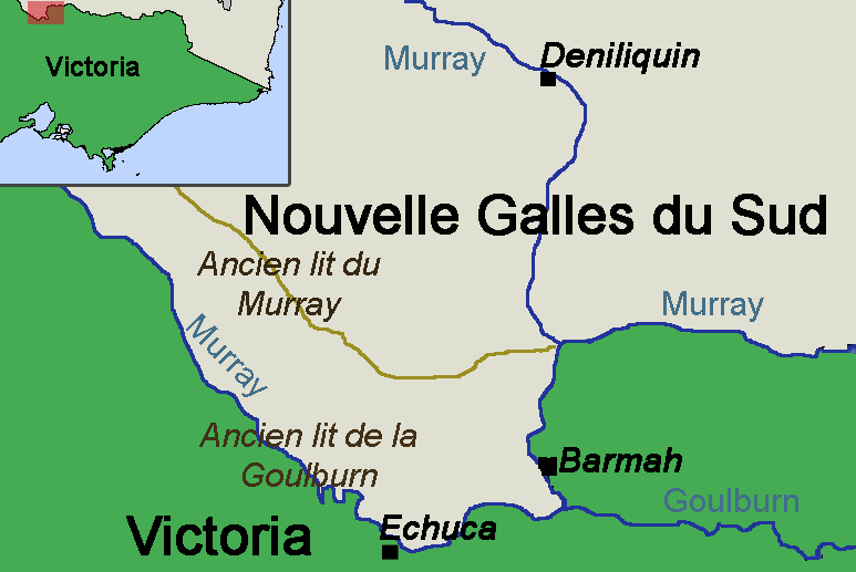 Barmah